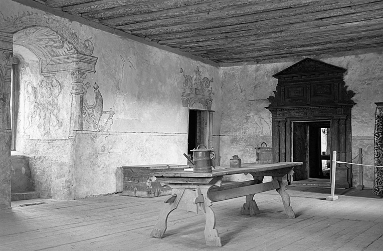 Riddarsalen, vars dekoration tillkom vid 1600-talets början. Motiv: Länghem 36:1 Nyckelord: Byggnadsminnen, Riksintressen Kategori: Slott Riddarsalen, vars dekoration tillkom vid 1600-talets början. Länghem 36:1.